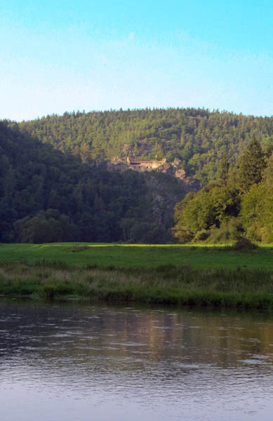 Zřícenina hradu Krašov z údolí řeky Berounky.